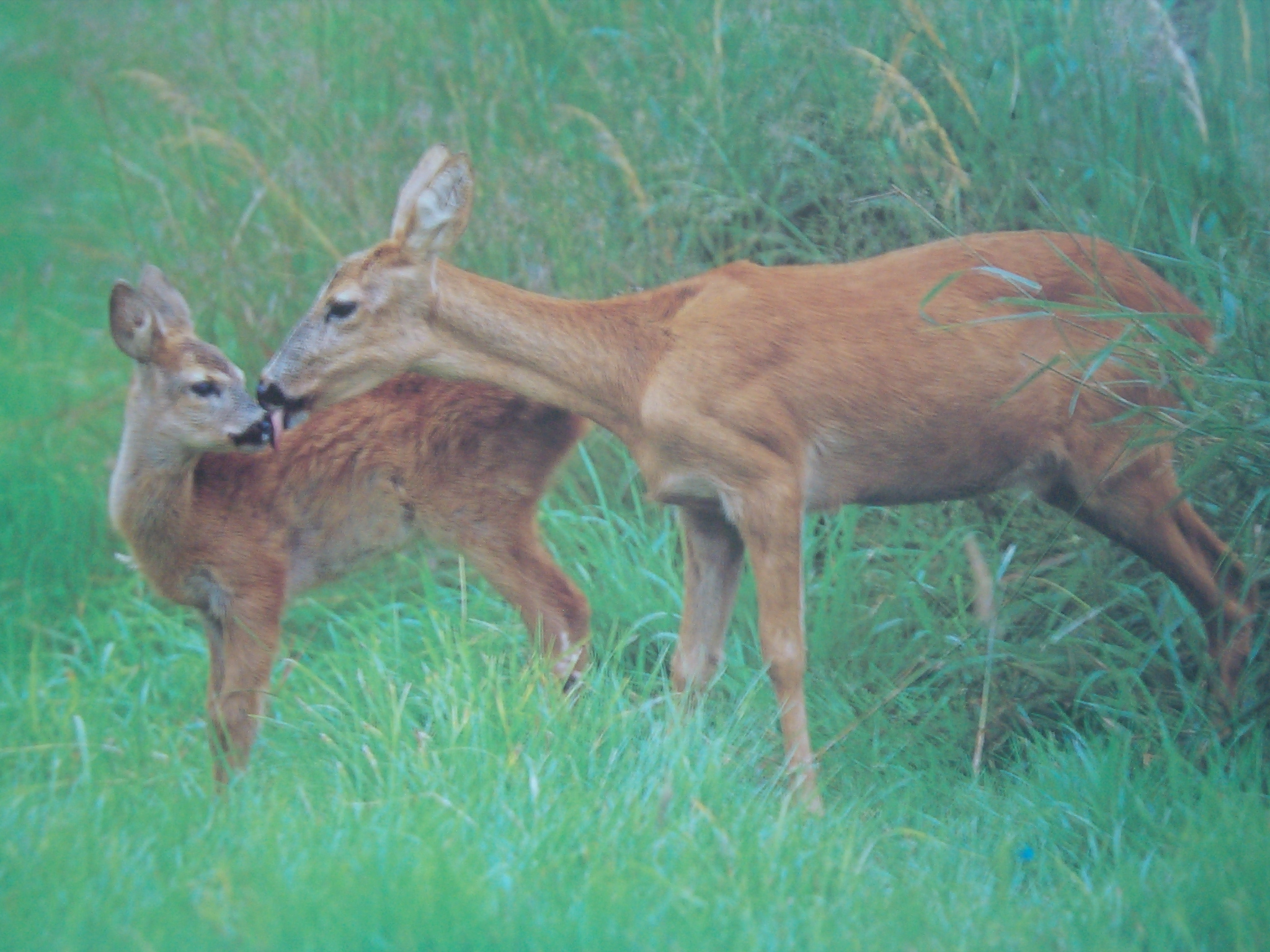 Roe and fawn